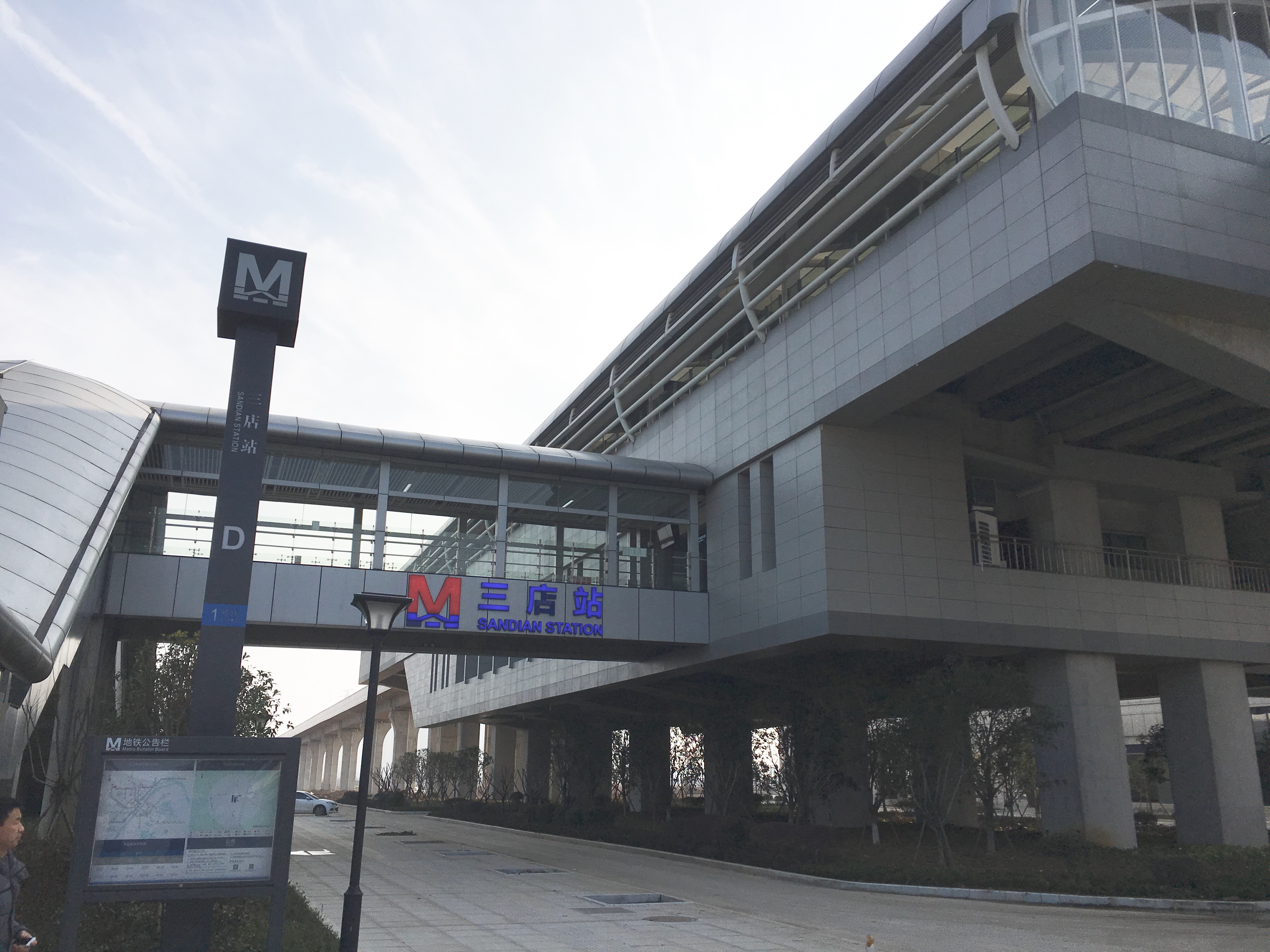 轨道交通1号线三店站外景